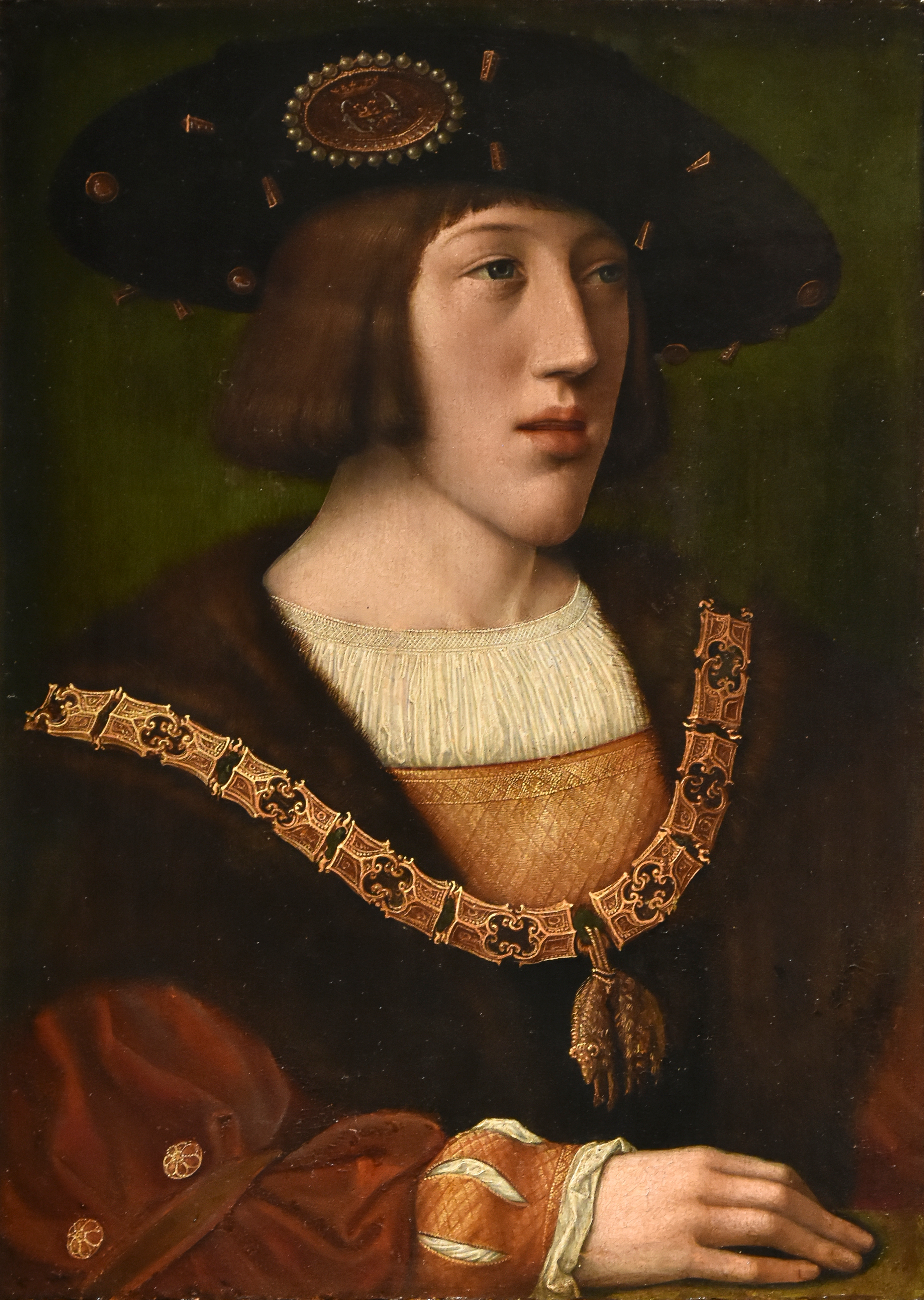 Karel V - Koninklijk klooster van Brou - besteld door Margaretha aan van Orley in 1516 om de kinderen van haar intussen overleden broer Filips de Schone te portretteren